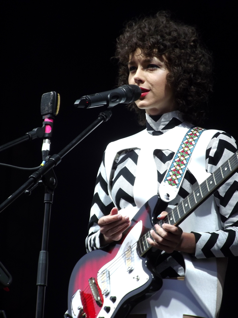 Zdjęcie zrobione podczas drugiego dnia Life Festivalu 2013 w Oświęcimiu.